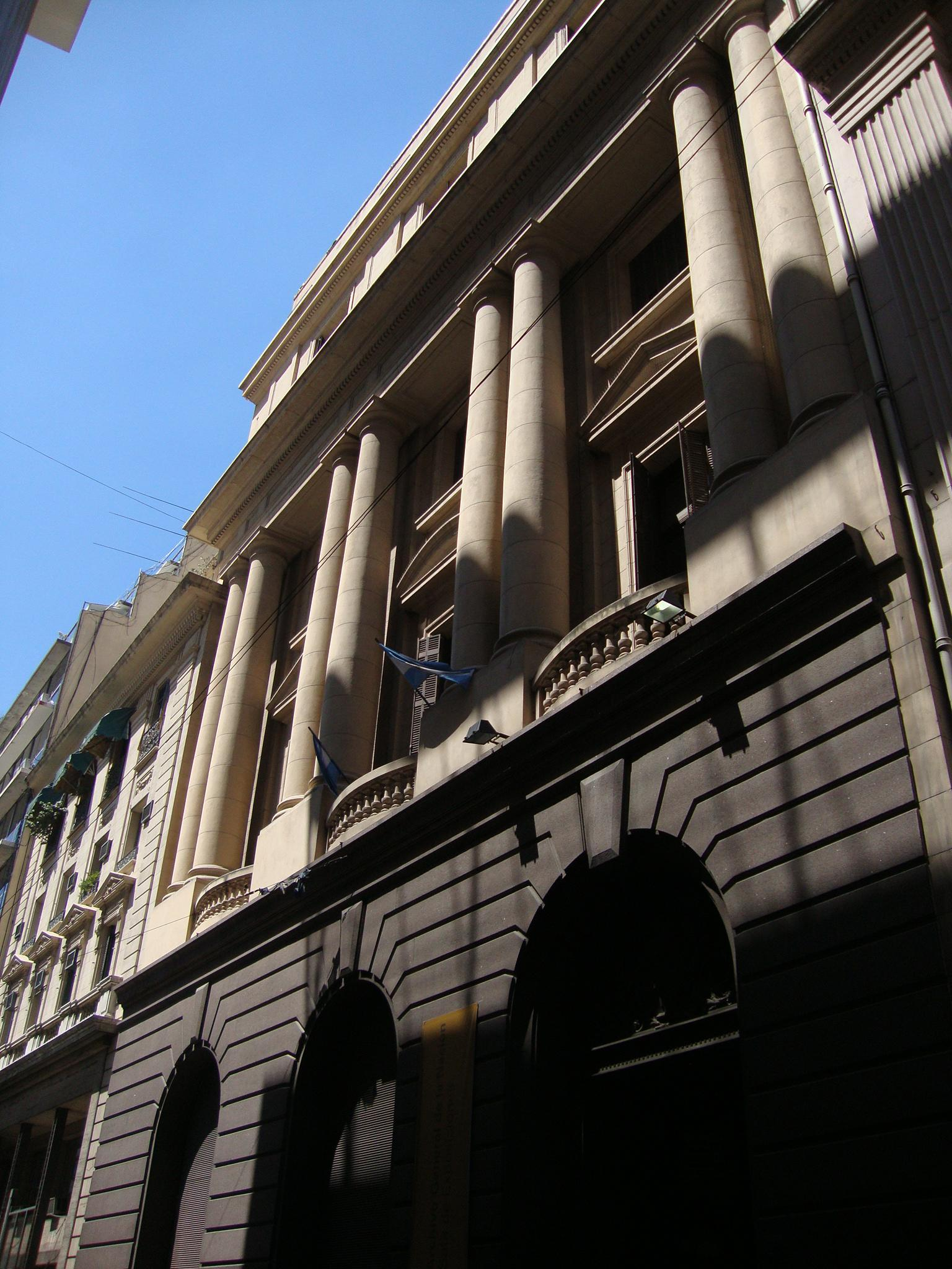 Fachada trasera del edificio del Archivo General de la Nación de la Argentina, en la calle 25 de Mayo 247, obra del ingeniero arquitecto Arturo Prins.